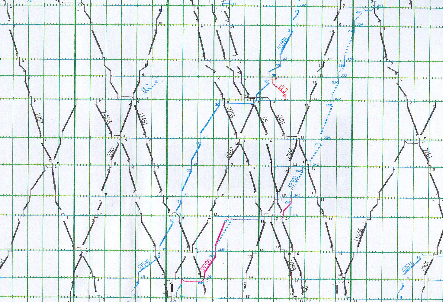 Esempio di grafico reale di traffico ferroviario in una tratta a semplice binario.